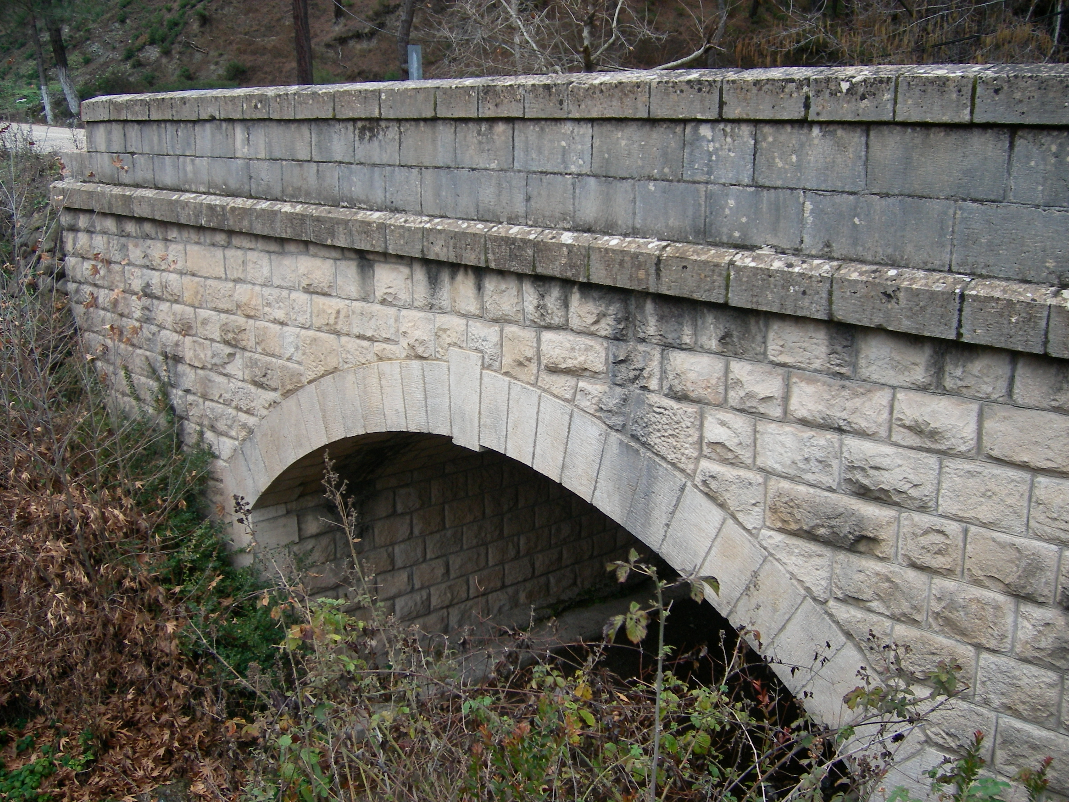 Yayladağı'ndan çeşitli görüntüler